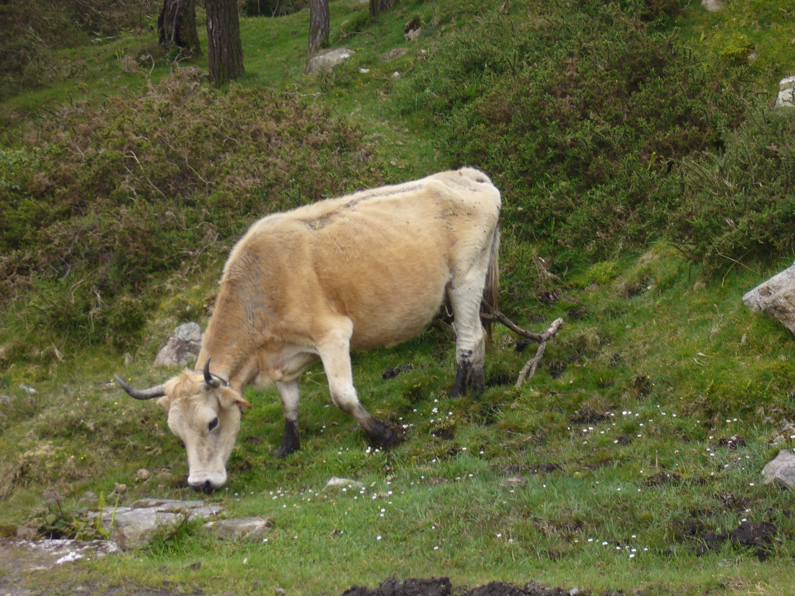 Asturiasko mendiko behia Sueven